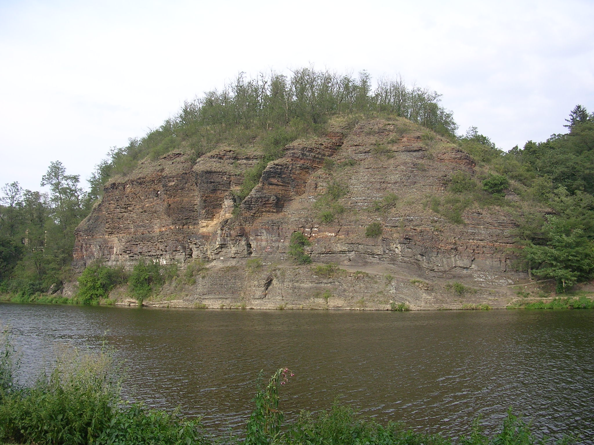 Kazín. Skalní ostroh nad Berounkou v katastrálním území obce Jíloviště.